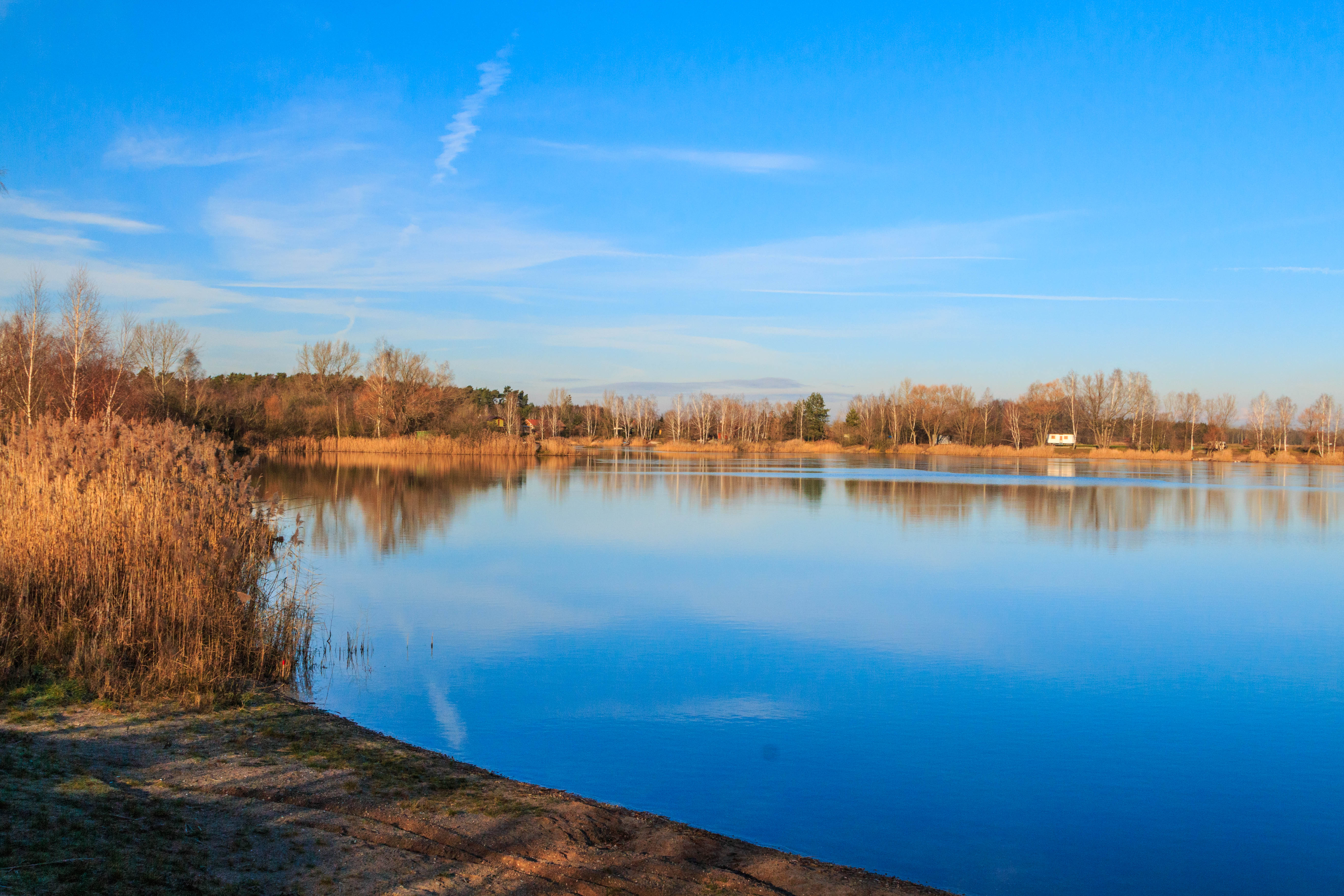 Písník Malá Čeperka Project: Vodstvo.